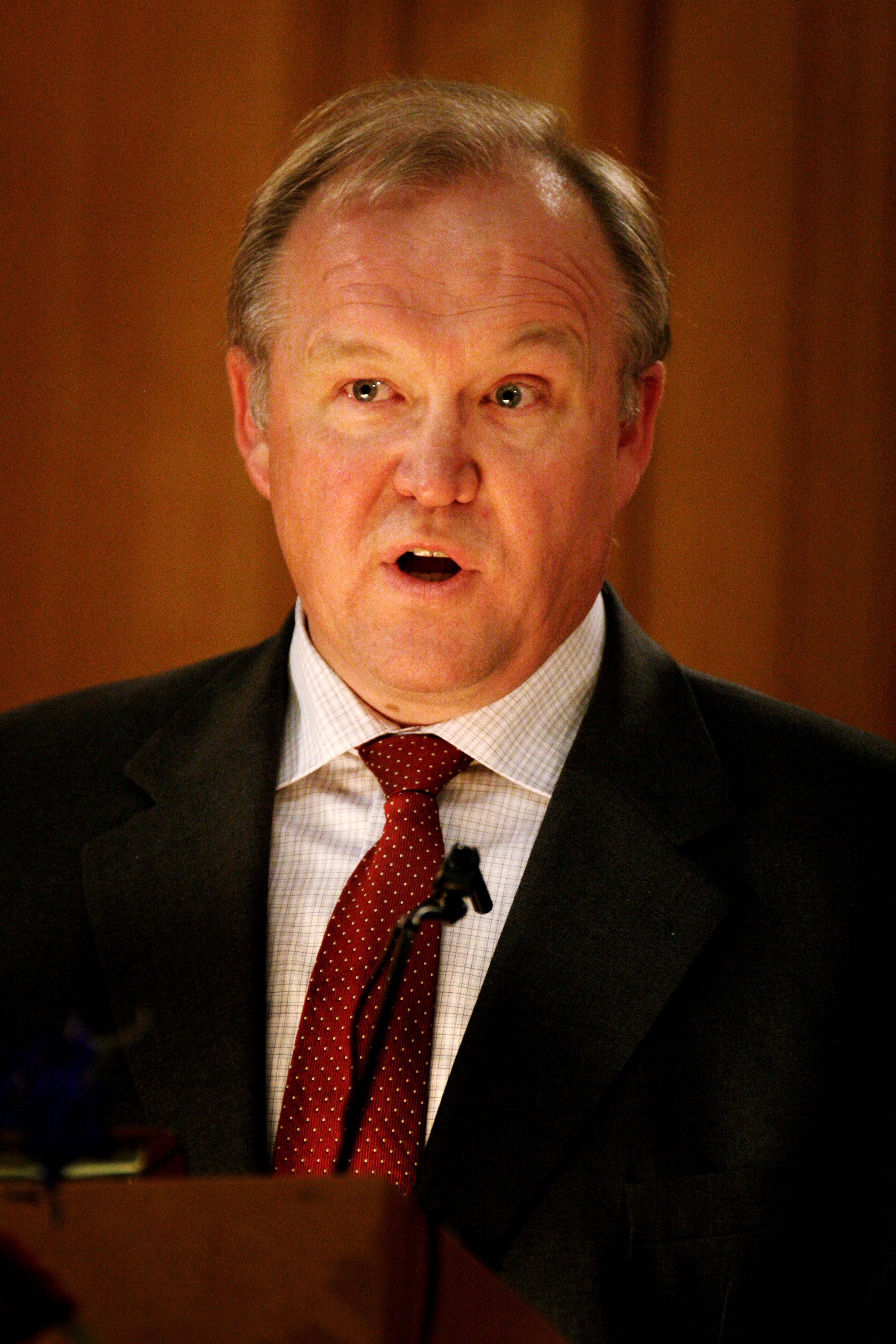 Göran Persson, Sveriges statsminister, talar vid Nordiska rådets session i Stockholm 2004.